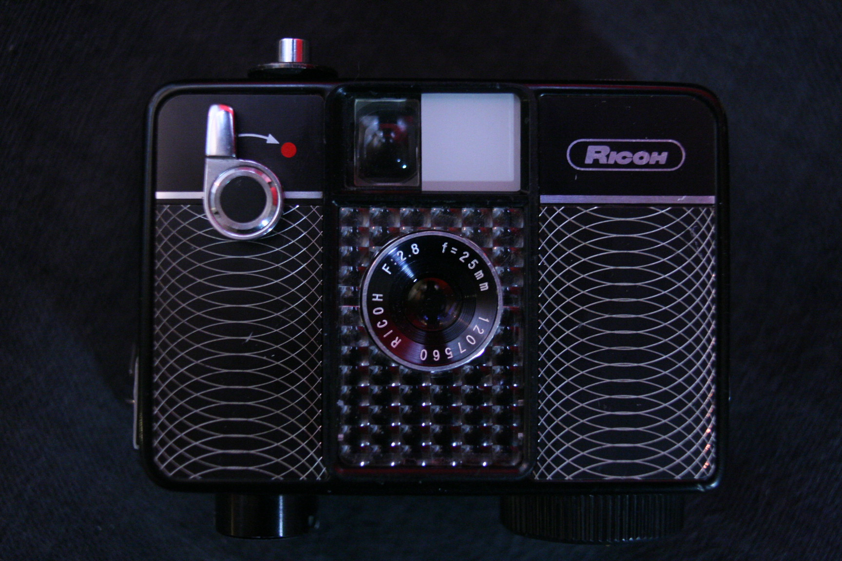 リコーオートハーフＳＥの波紋柄ブラック。このほかに鏡面シルバーのものが存在する。その他の特別仕様品については不明。